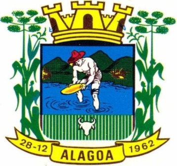 Extração do Outro, atividade pioneira e desbravadora de Alagoa; Araucárias e Pés de Milho, representando a flora e agricultura; Cabeça de Boi, assinalando a pecuária leiteira; no fundo, as montanhas que destacam nossa topografia acidentada.